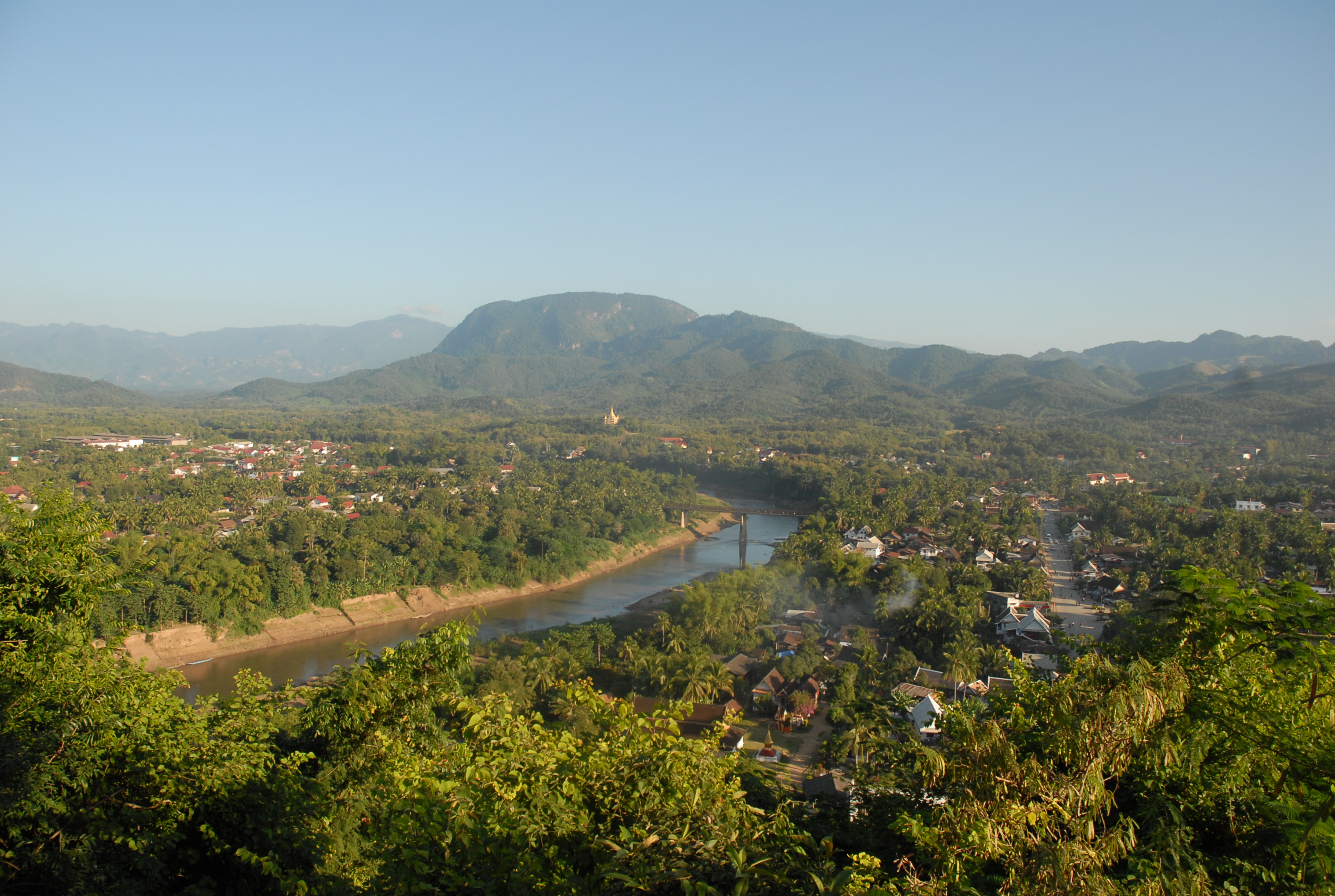 Luang Prabang : vue partielle, avec la rivière Nam Khan, depuis la colline de Phou Si